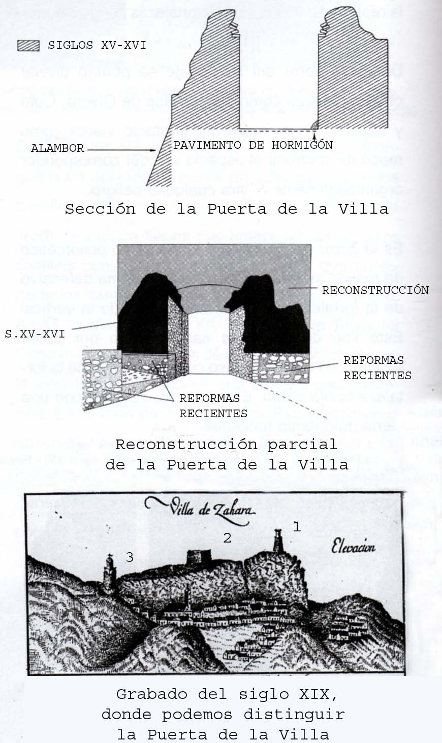 Reconstrucción de la Puerta de la Villa según los documentos